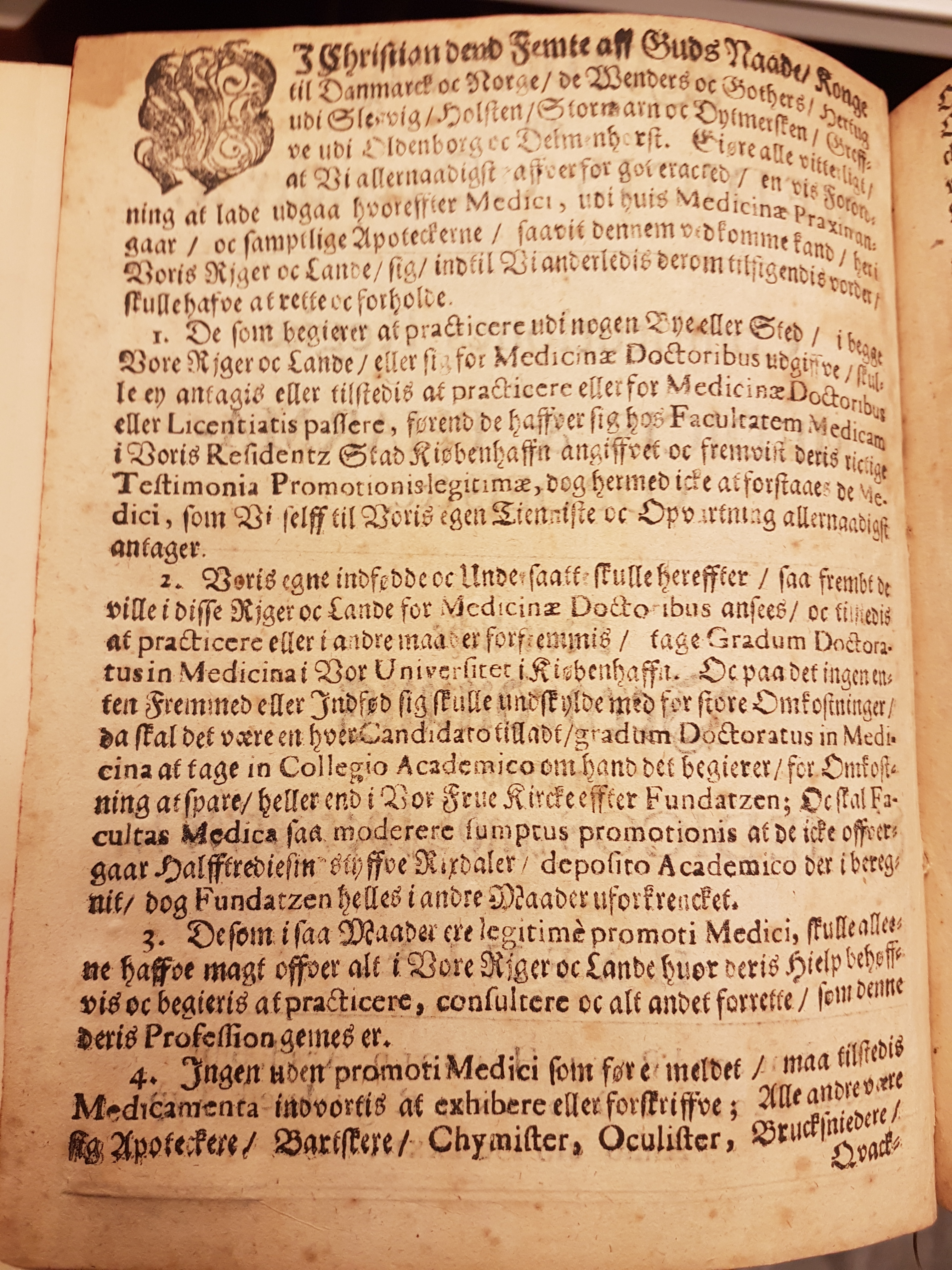 Forordning om Medicis og Apothekere av 4. desember, 1672 (Side 1)